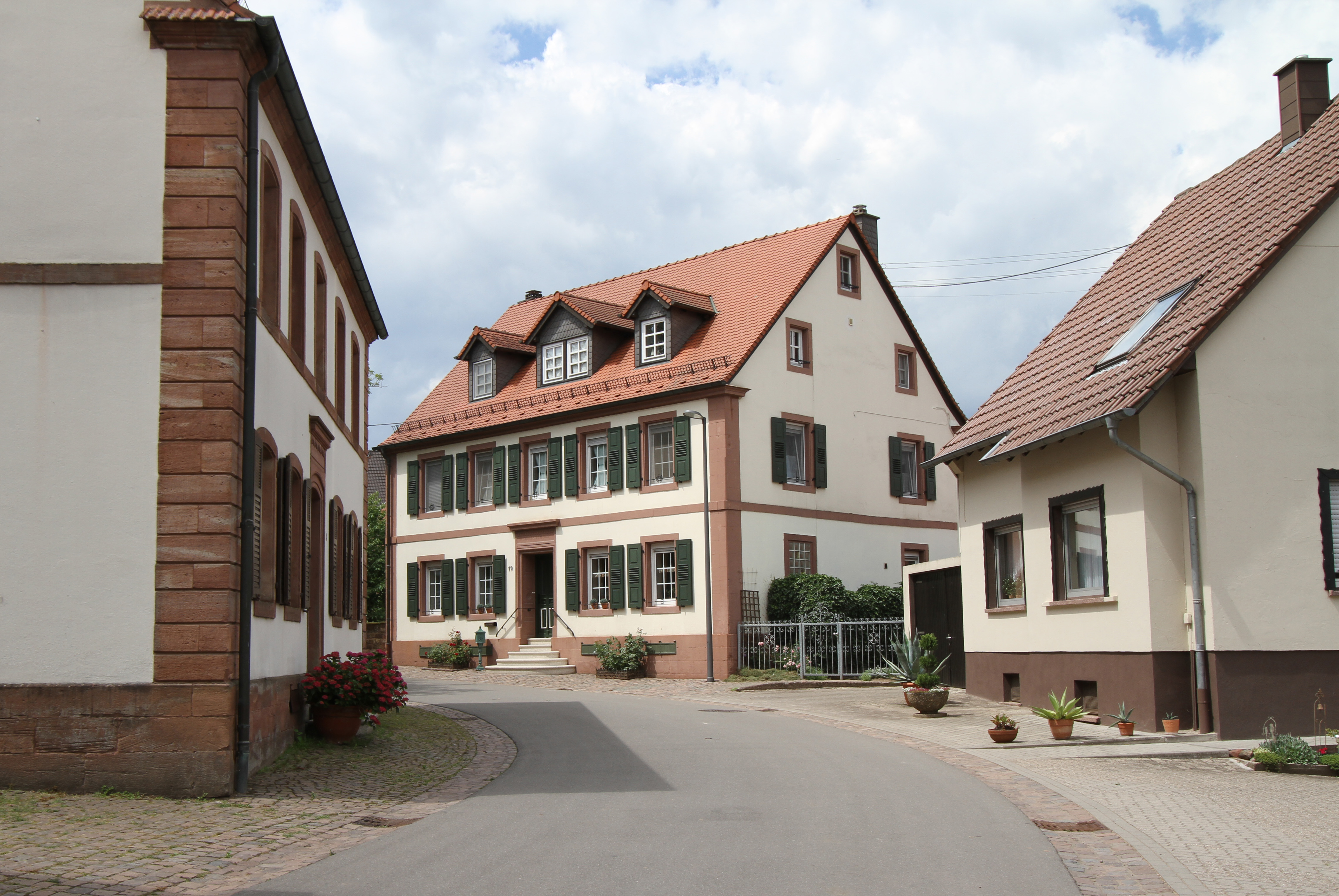 Schmitshausen